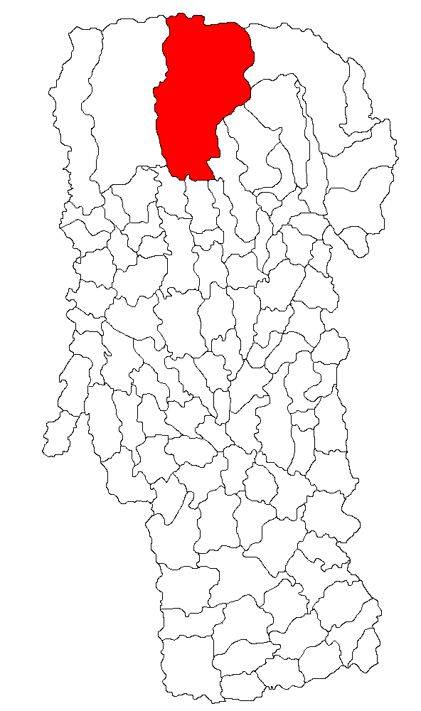 Categorie:Hărţi ale judeţului Argeş